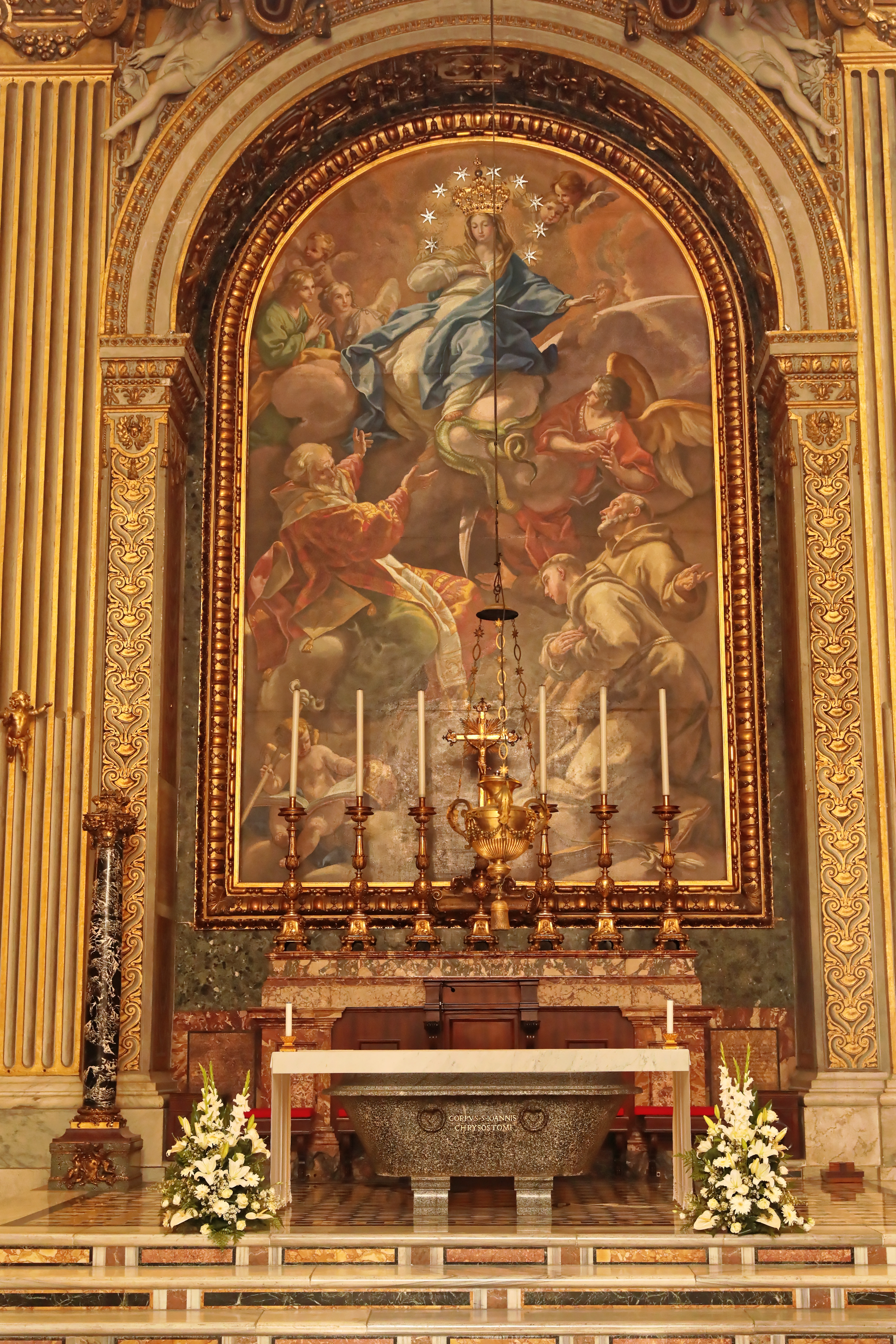 Seitenaltar